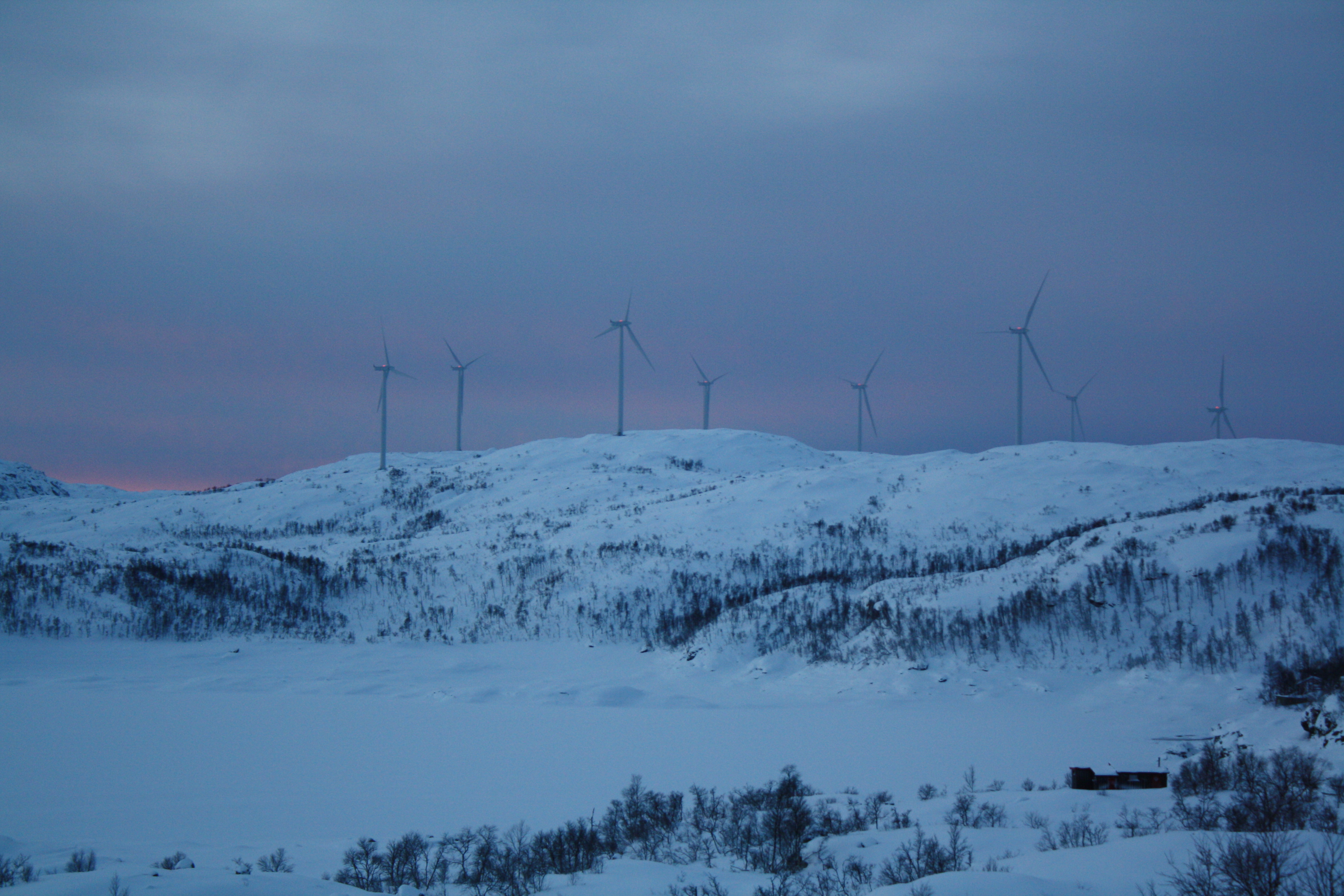 Vindmøller på Nygårdsfjell i Narvik, Nordland fylke.